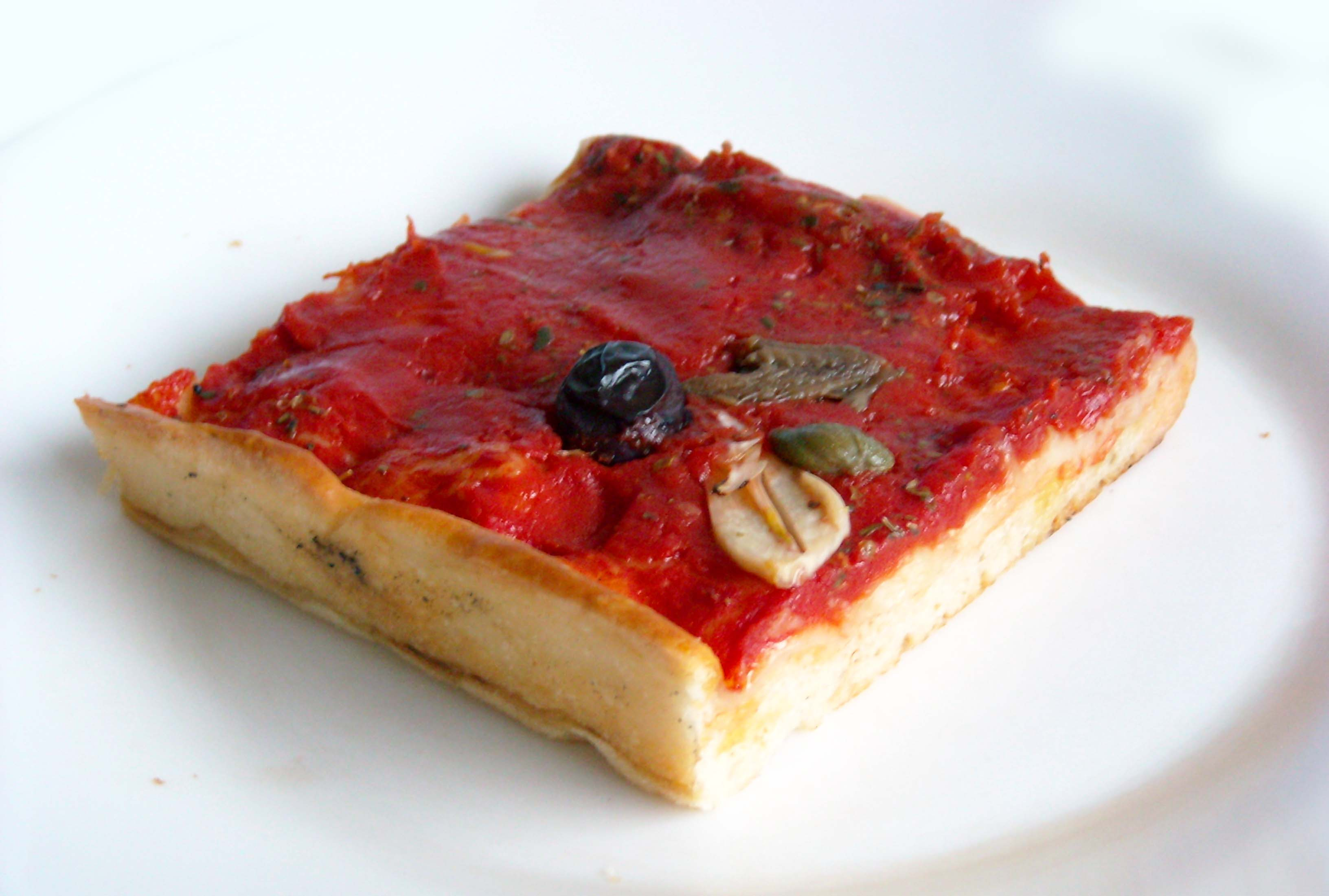 La Pisciadella nella Riviera dei Fiori in Liguria, Italia.